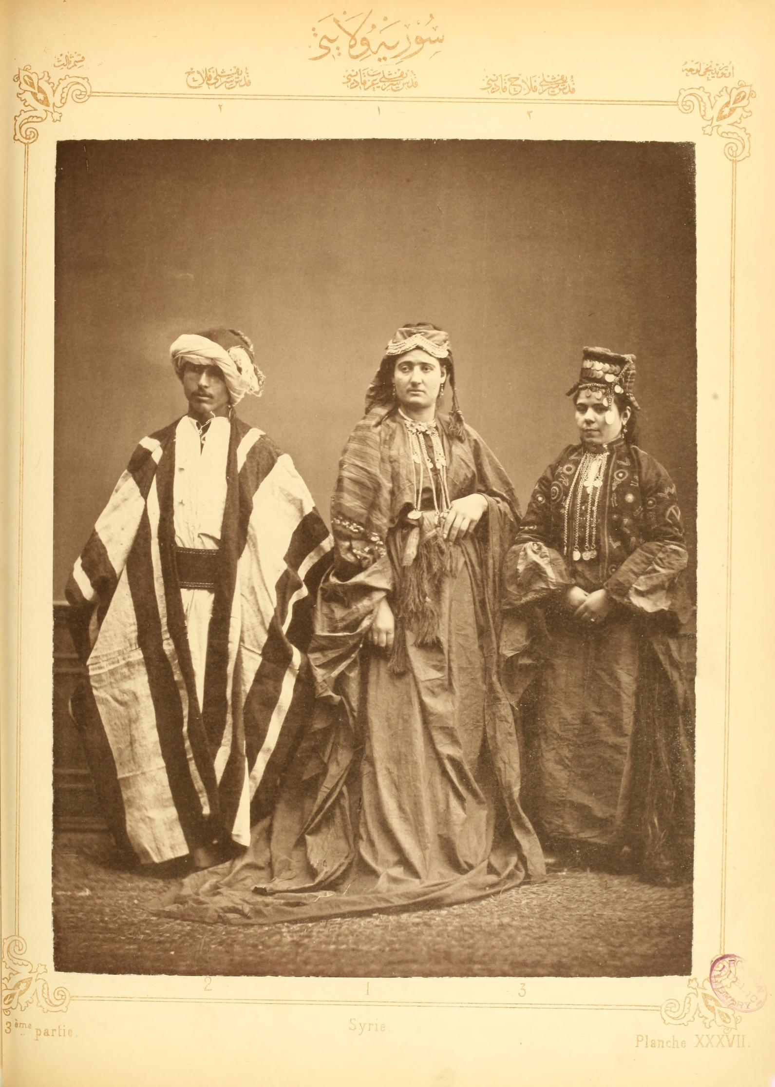 VILAYET DE SURIÈ (syrie) PLANCHE XXXVII : Dame arabe de Jérusalem Fellah des environs de Jérusalem Femme fellah des environs de Jérusalem